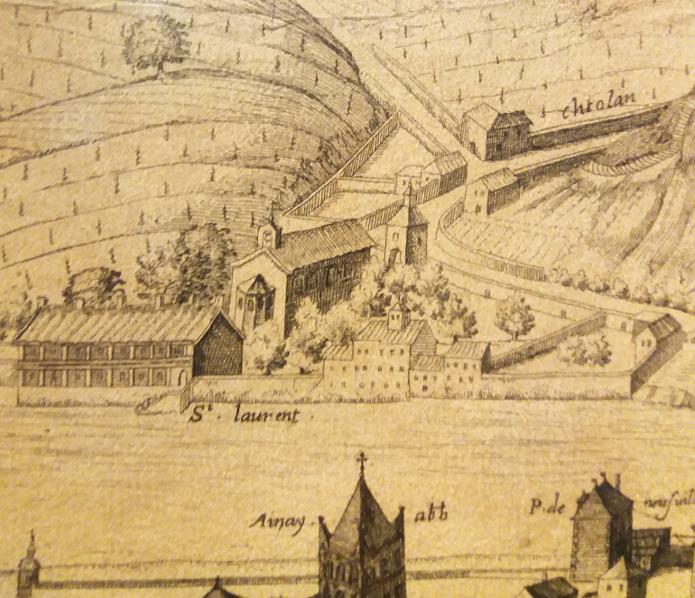 Détail sur la chapelle Saint-Laurent de Choulans.